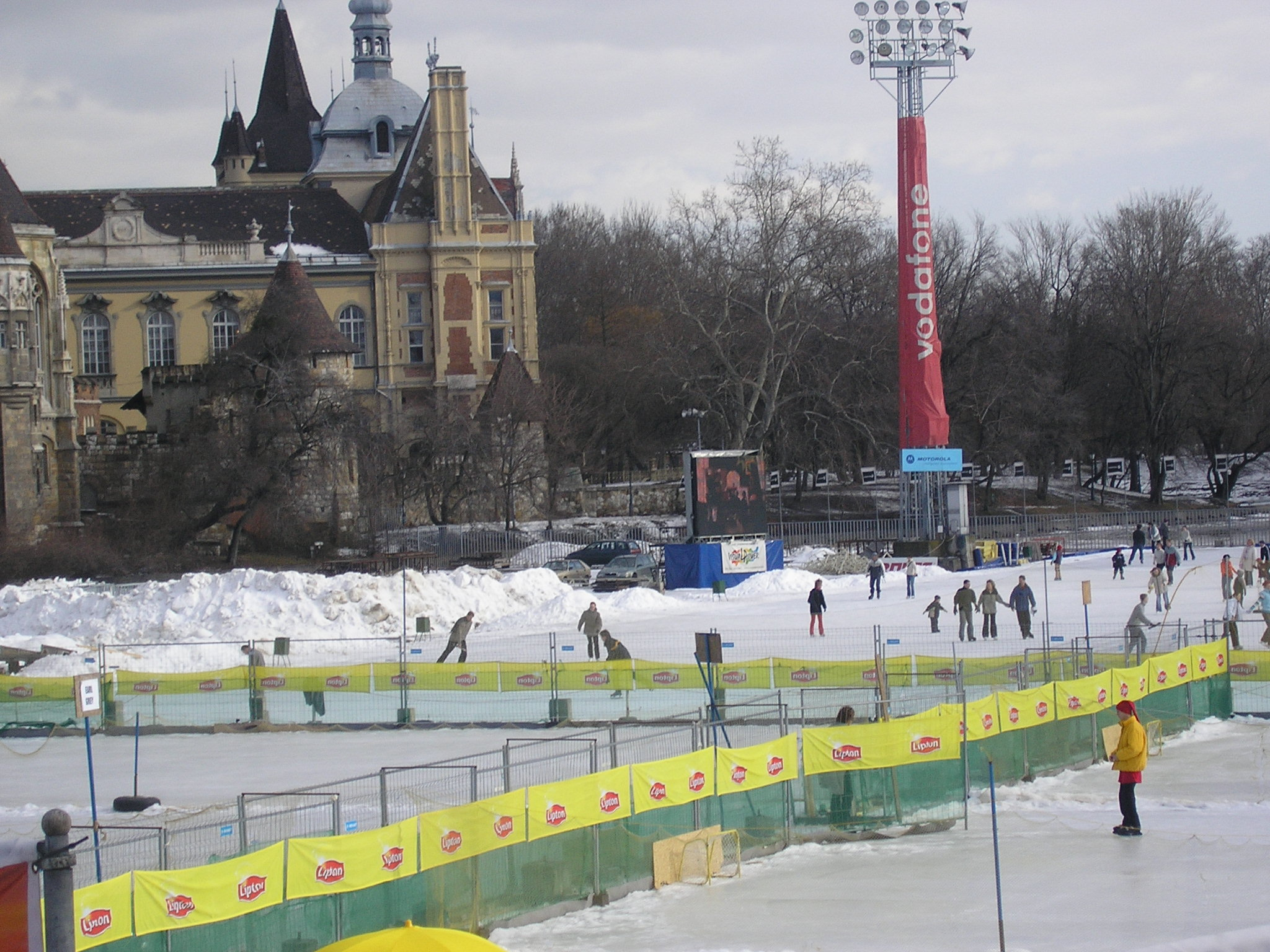 ice-skating in Budapest